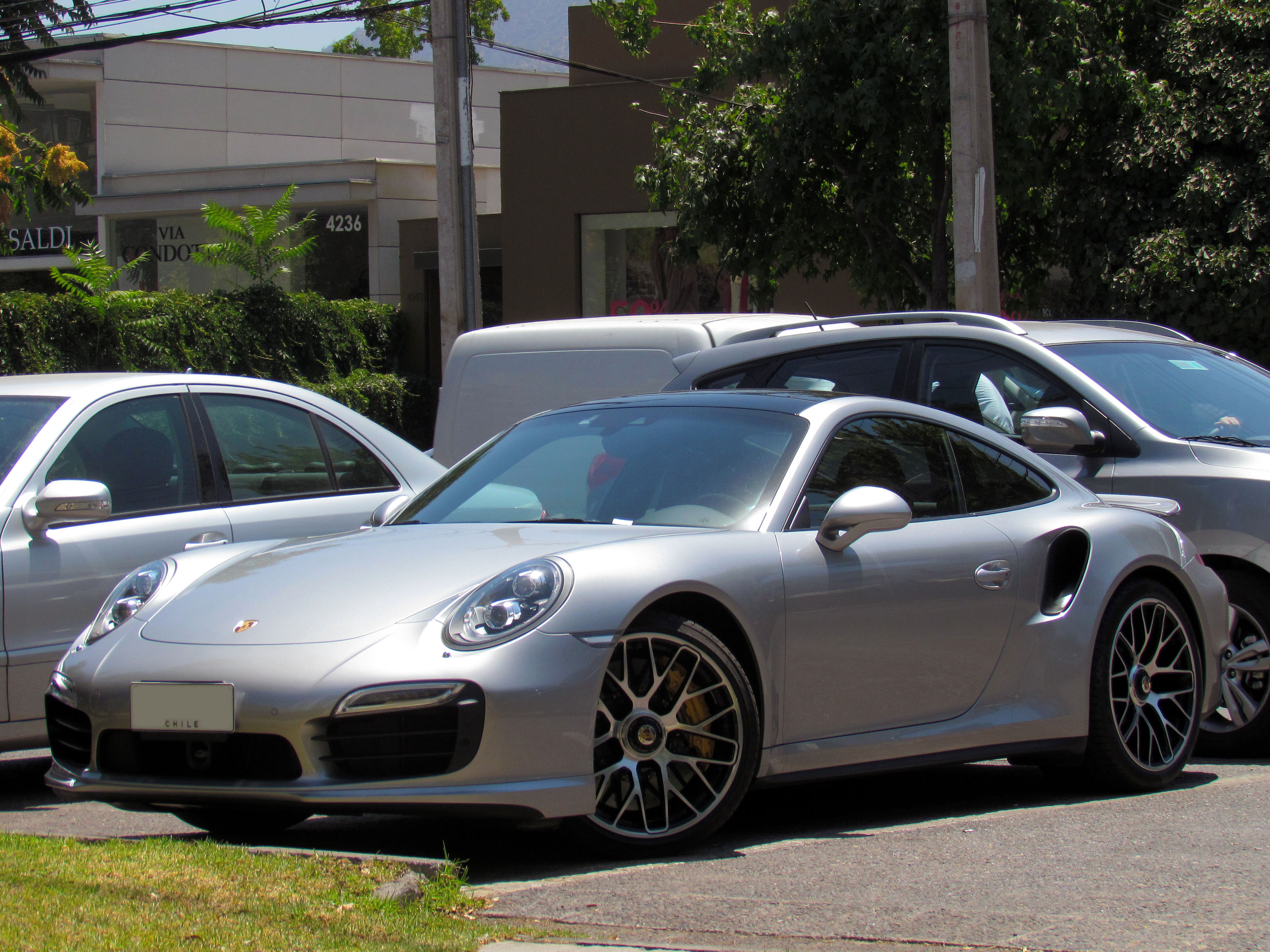 Porsche 911 S 2014